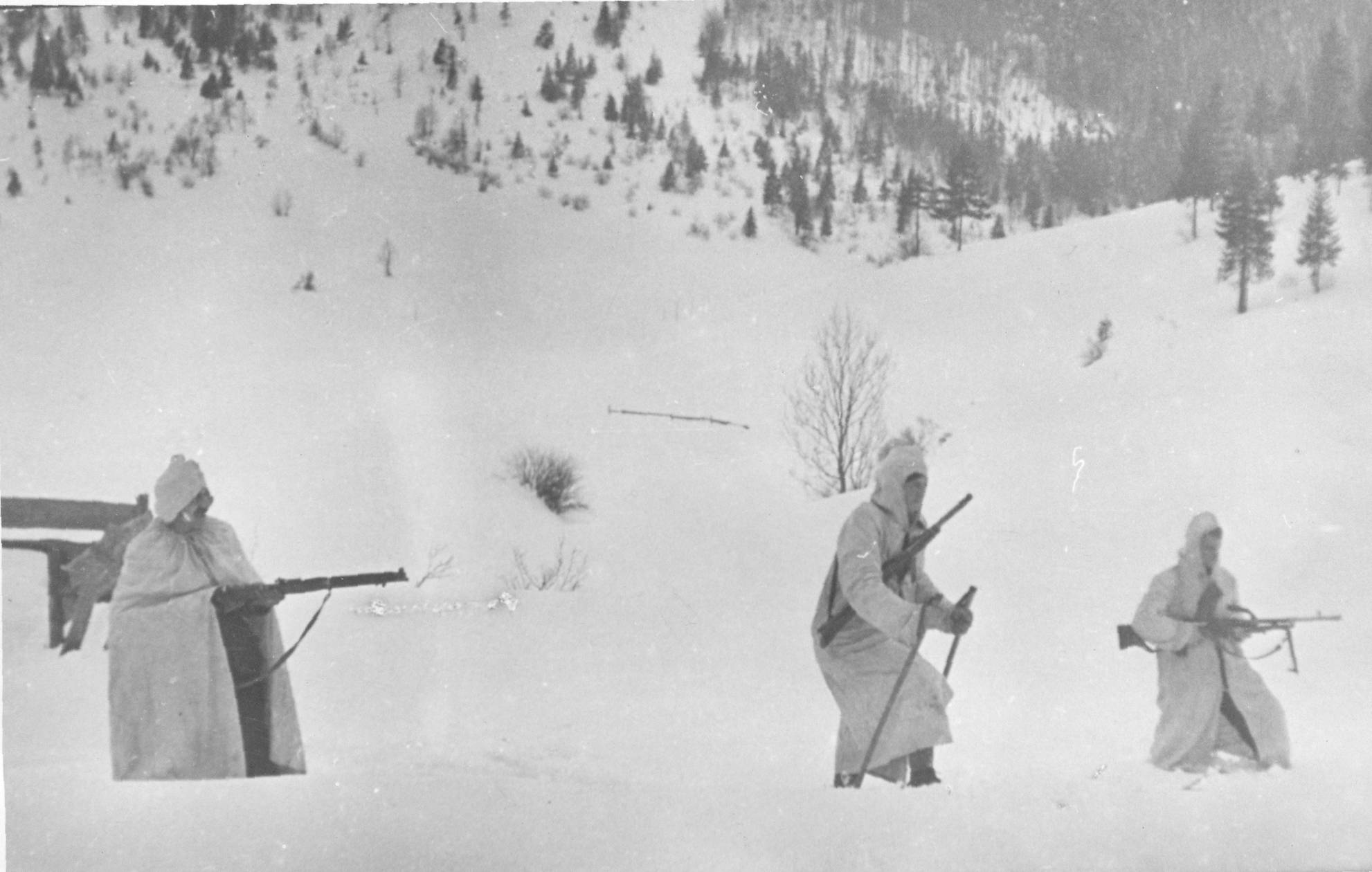 Partizanska patrola v kočevskih hribih.